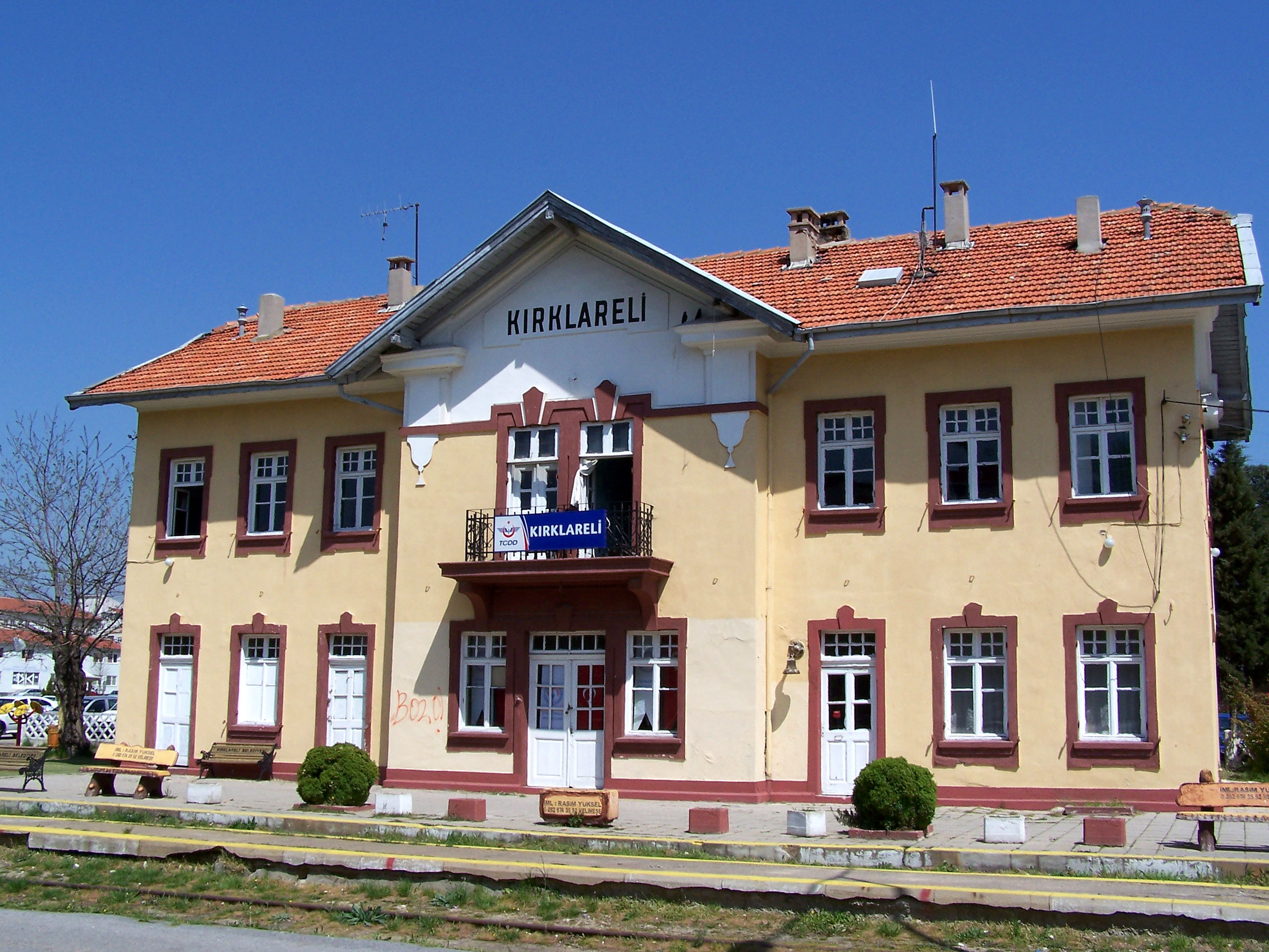 Train station in Kırklareli, Turkey